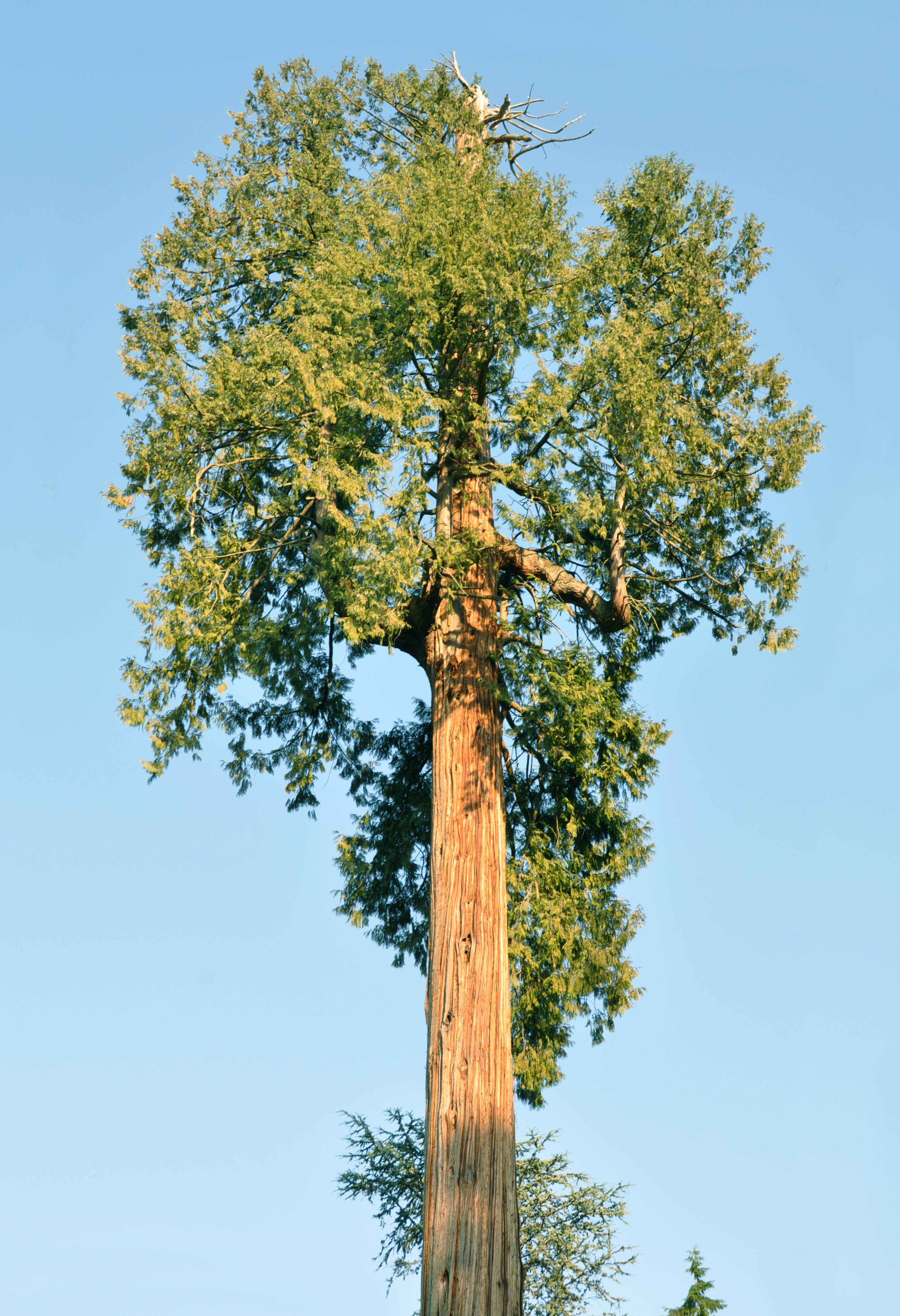 Thuja plicata, Vancouver, BC, Canada.